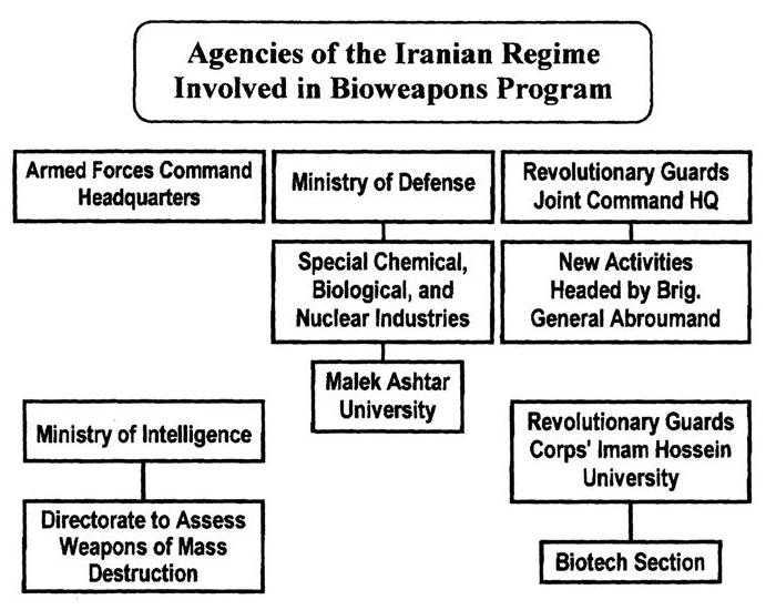 Iranisch Angebliche Befehlsstruktur über das Mikro-Biowaffenprojekt